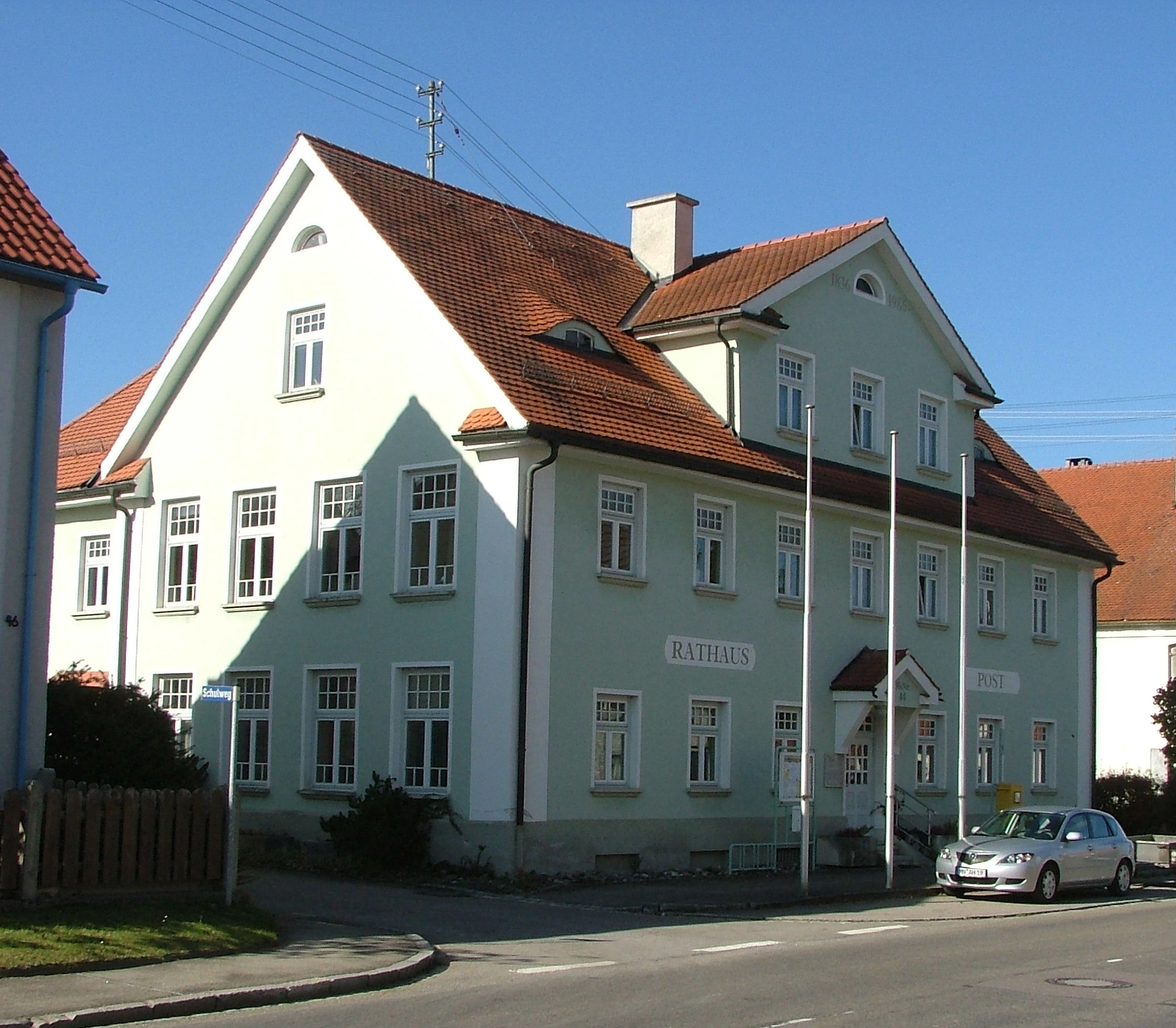 1836-1911 jüdische Schule,1911-1983 Gemeindeschule,heute Rathaus